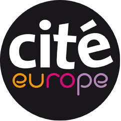 Le logo de la Cité de l'Europe